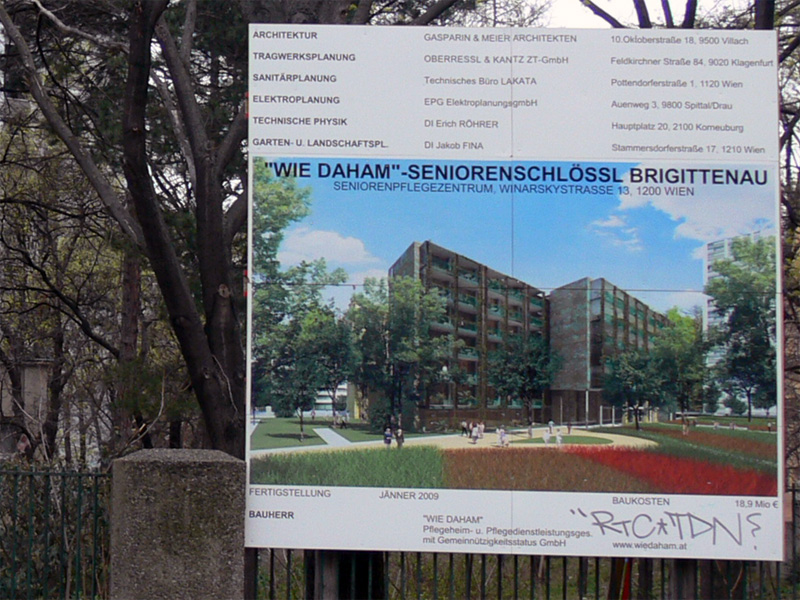 Männerwohnheim Meldemannstraße 27, Wien, Österreich